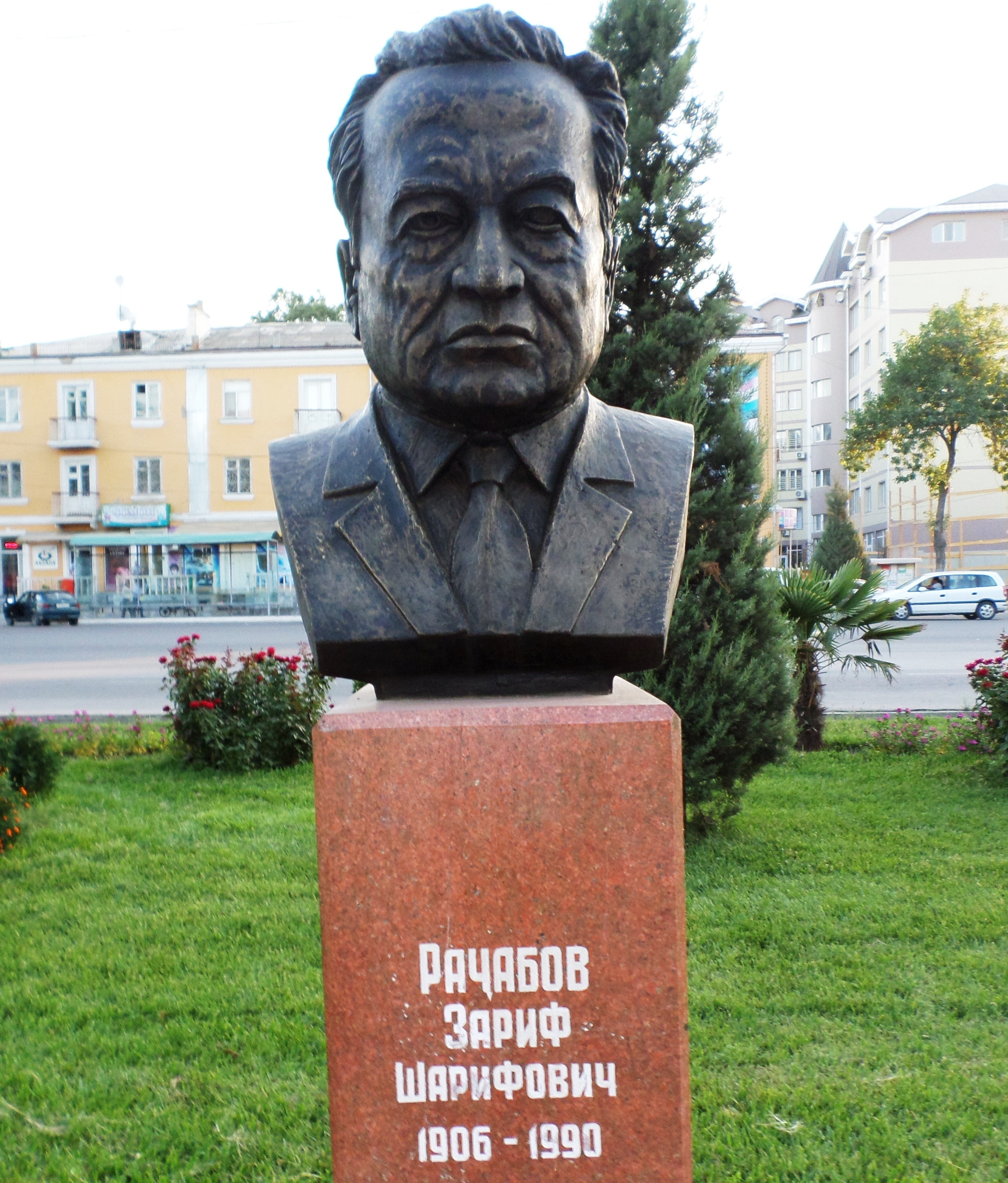 Зариф Раджабов - государственный и партийный деятель, ученый Таджикской ССРТоҷикӣ: Зариф Раҷабов - олим, ходими давлатӣ ва ҳизбии ҶШС Тоҷикистон